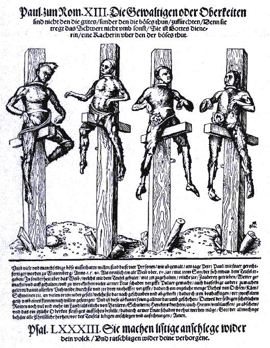 Holzschnitt, der als Flugblatt die Verbrennung von vier Personen als Hexen in Wittenberg 1540 zur Abschreckung zeigt. Besonders grausam werden die Opfer lebend laut Zeitzeugen "an Säulen gebraten", indem sie "an Eichenpfeilern emporgesetzt, angeschmiedet und mit Feuer, wie Ziegel, jämmerlich geschmäucht und abgedörrt wurden." (Buchwald; J. Mathesius, s. Quelle, S. 142) Der Text des Flugblatts findet sich im Artikel zu